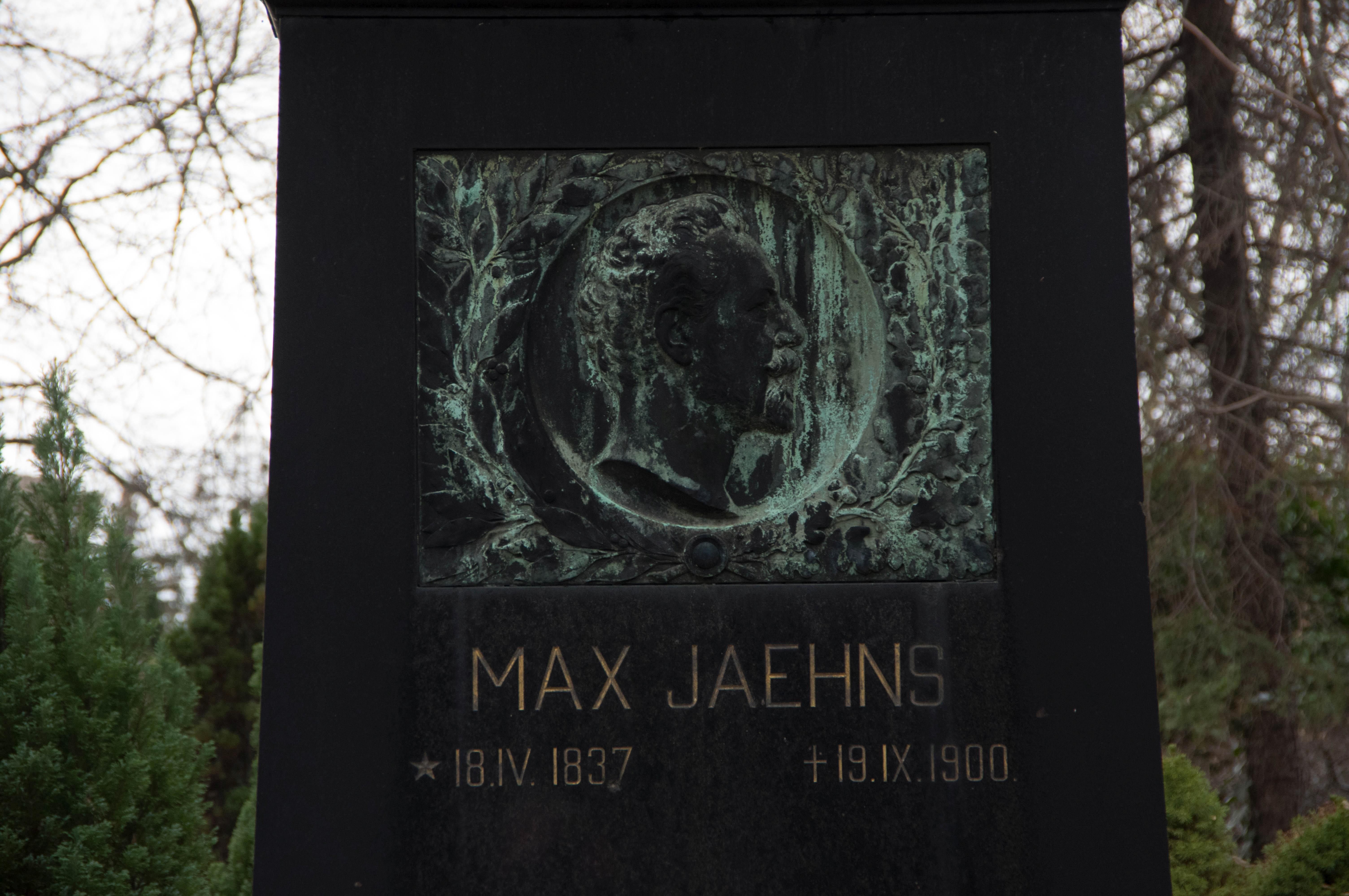 Berlin. Bethlehemsfriefhof in Kreuzsberg an der Zossener Straße. Das Medallion ist Teil des Grabstein für Max Jaehns, ein Oberstleutnat. Erschaffen wurde es nach einem Model von Fritz Heinemann.